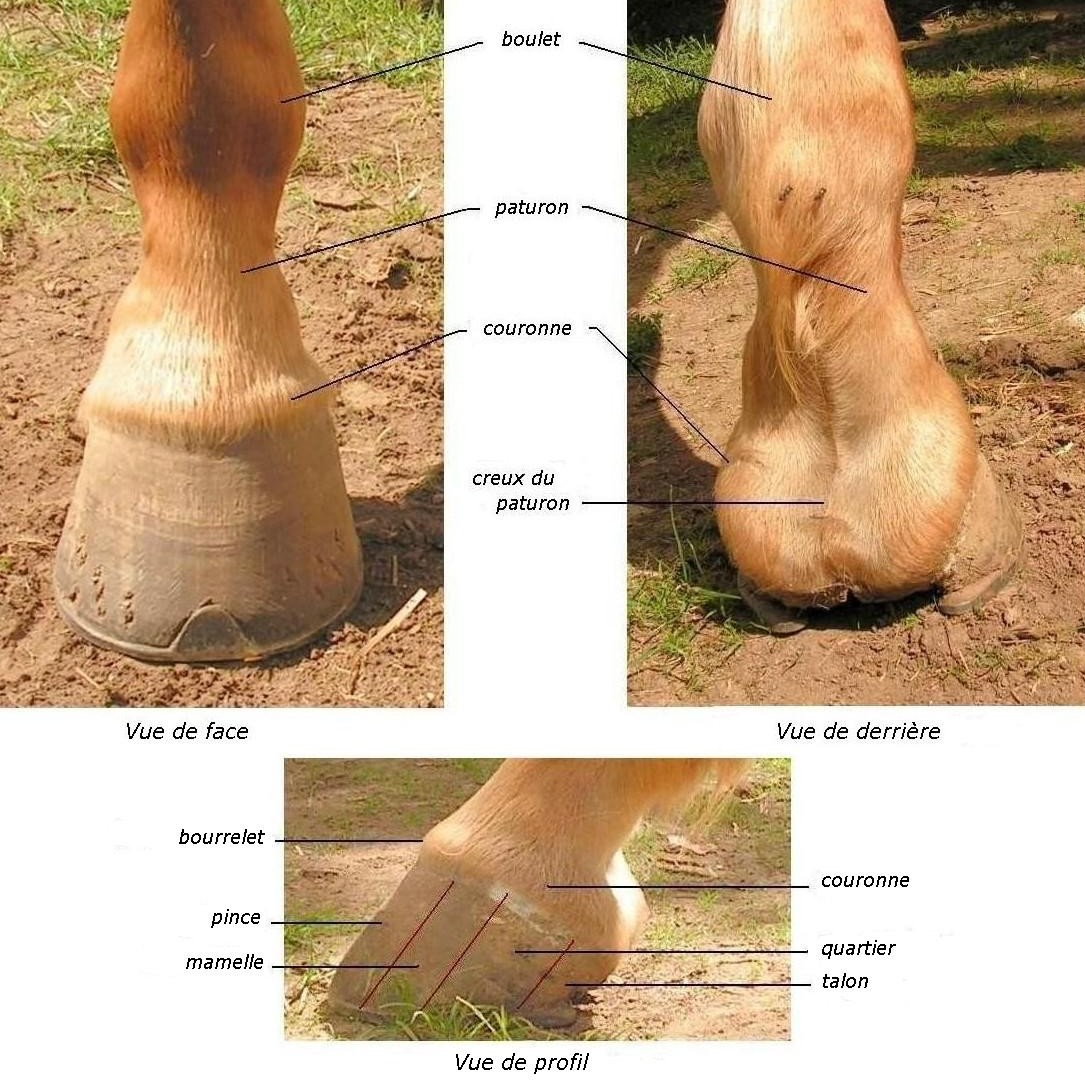 Pied d'un cheval avec annotations Septembre 2006 Source : montage à partir de photos personnelles